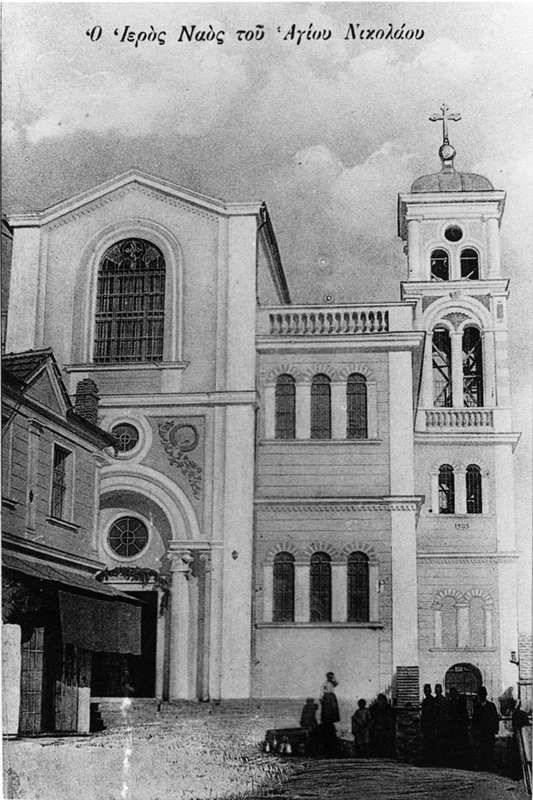 Митрополитската църква на Охридско-преспанска епархия "Свети Никола", гръцка пощенска картичка